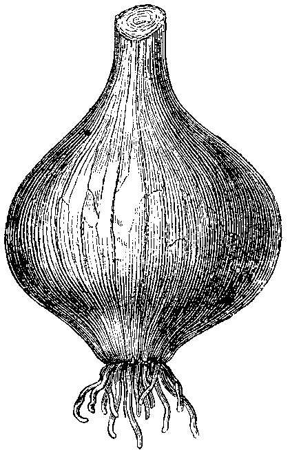 Slika 3. Čebula.